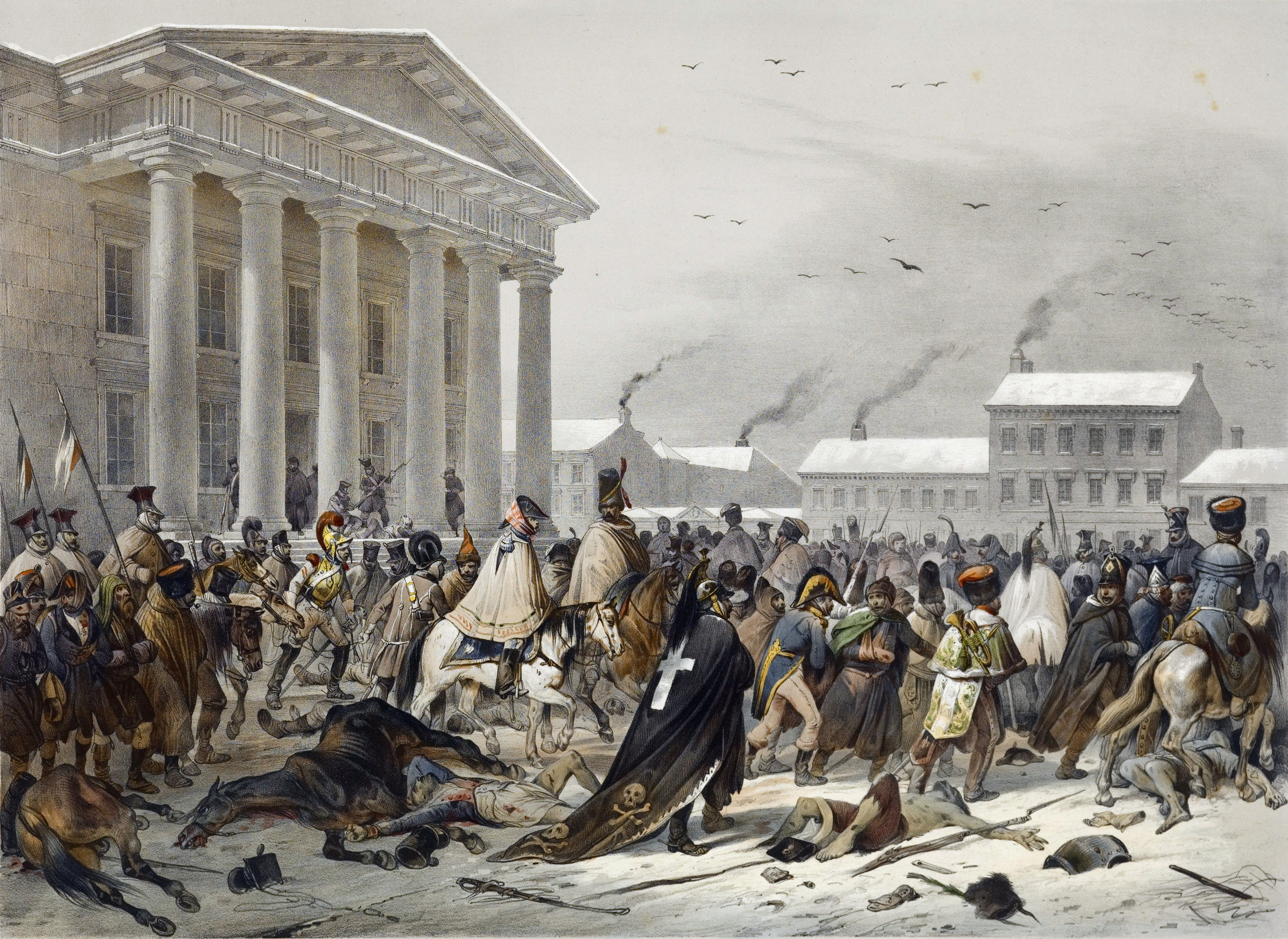 Беларуская (тарашкевіца): Вільня (Vilnia), пляц Ратушны (plac Ratušny). Адступленьне французаў